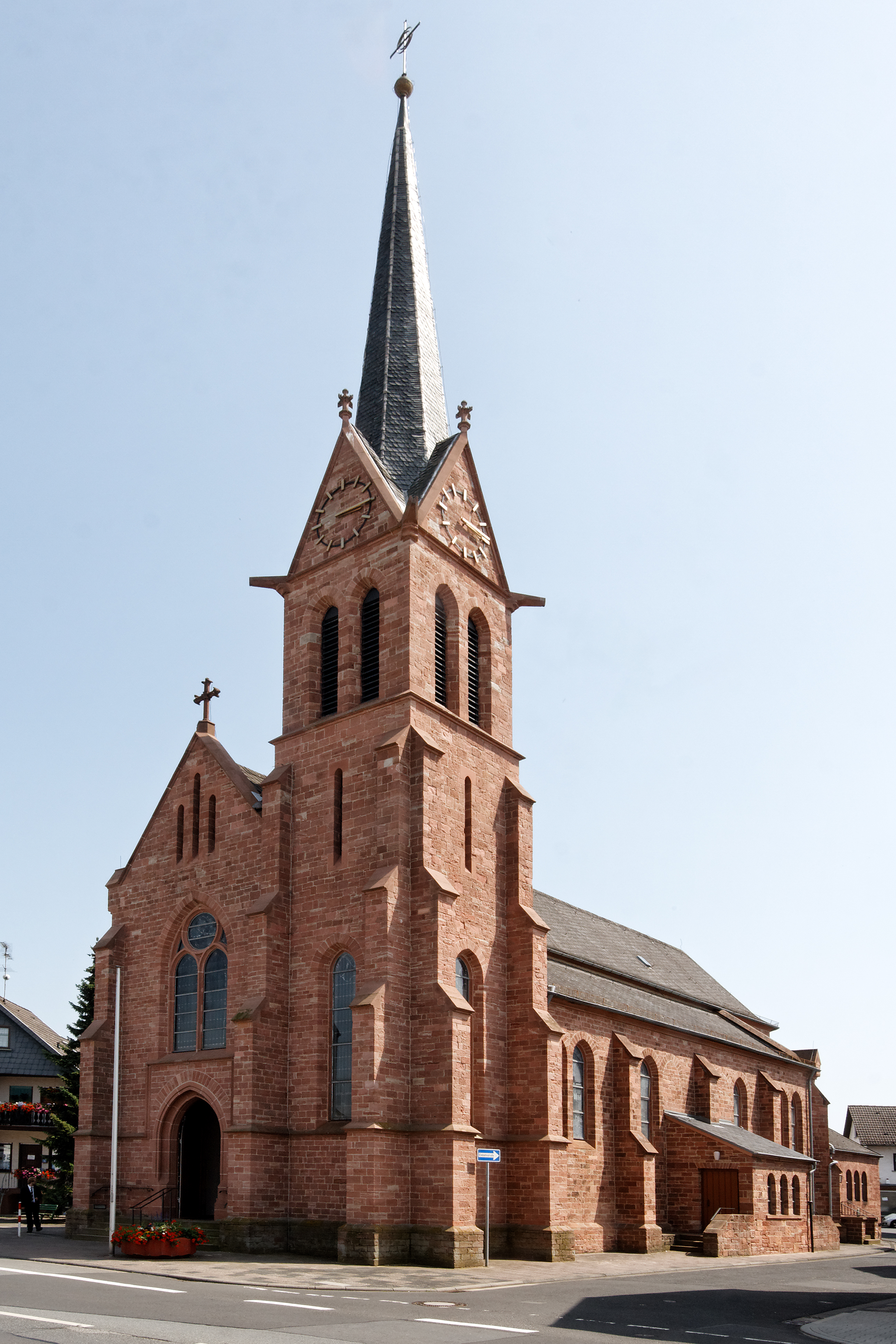 Katholische Kirche St. Margareta in Froschhausen, einem Stadtteil von Seligenstadt (Hessen): Grundsteinlegung 1869, Weihe 1871.